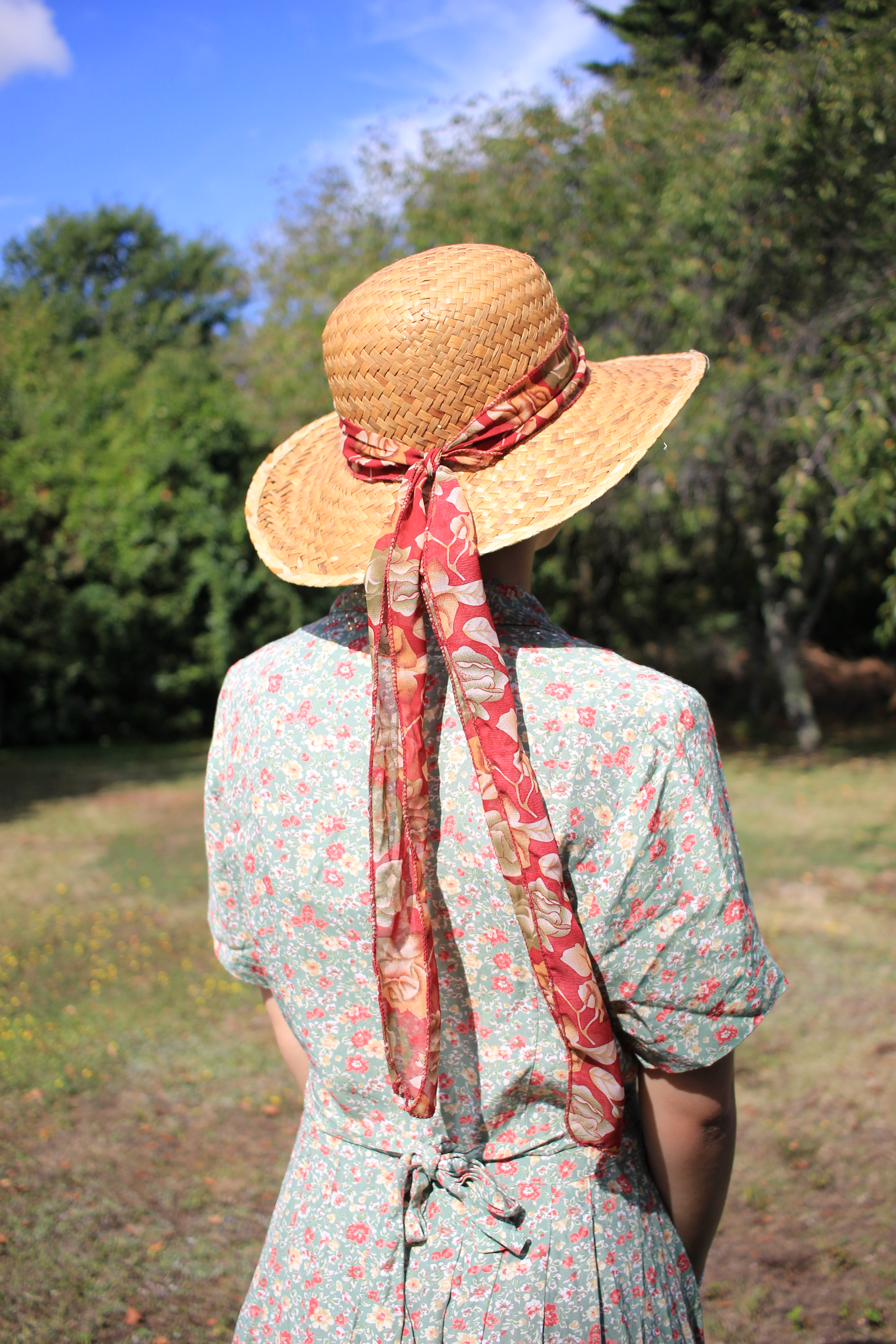 femme avec un suivez-moi-jeune-homme au chapeau.